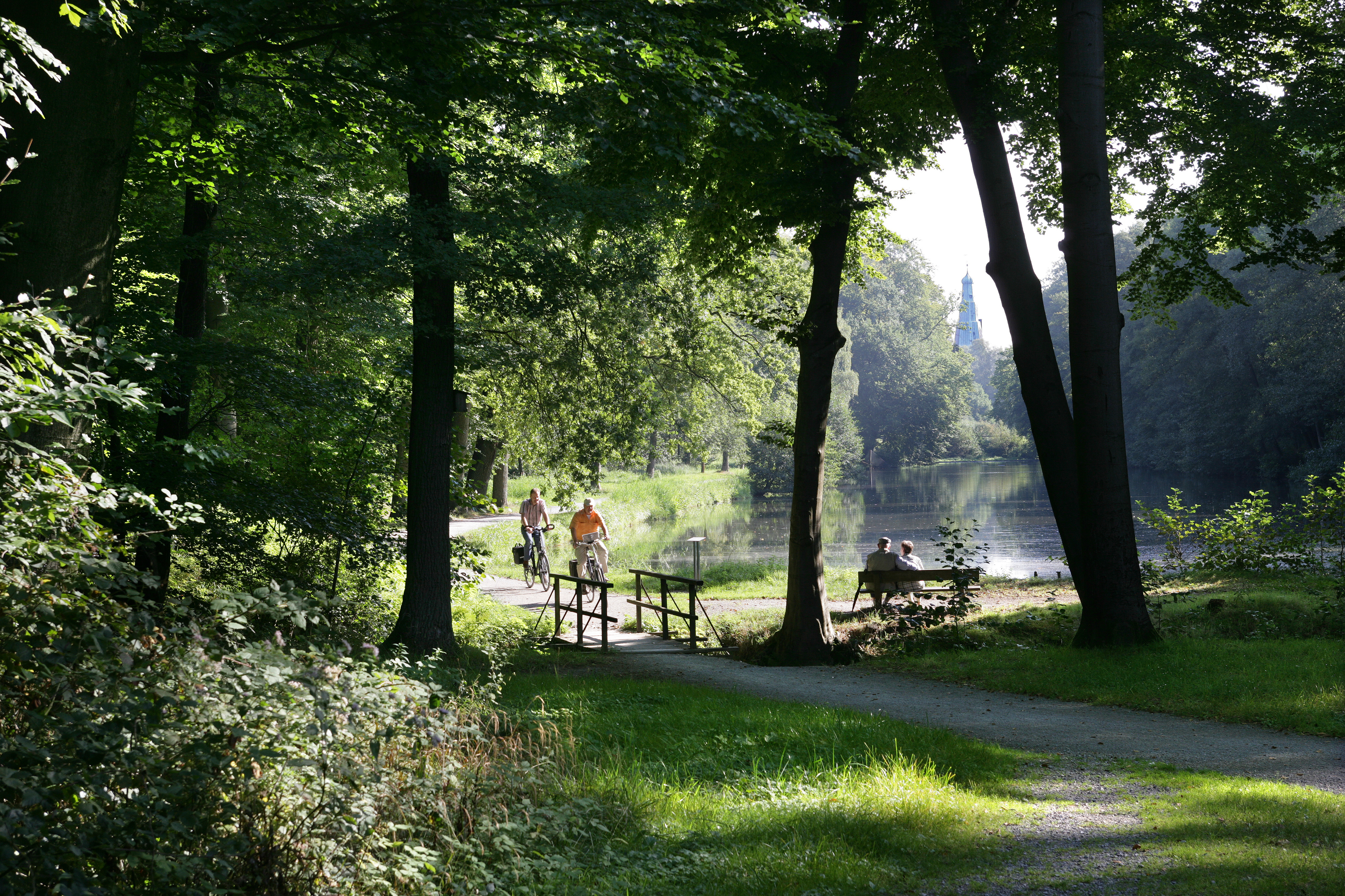 Perspektive im "Renaissance-Tiergarten Schloss Raesfeld". In der Sichtachse über den "Langen Teich" auf die Turmspitze des Hauptturms des Wasserschlosses. Schloss Raesfeld liegt im "Naturpark Hohe Mark".